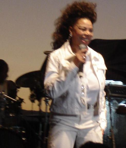 millie jackson @ sunset junction